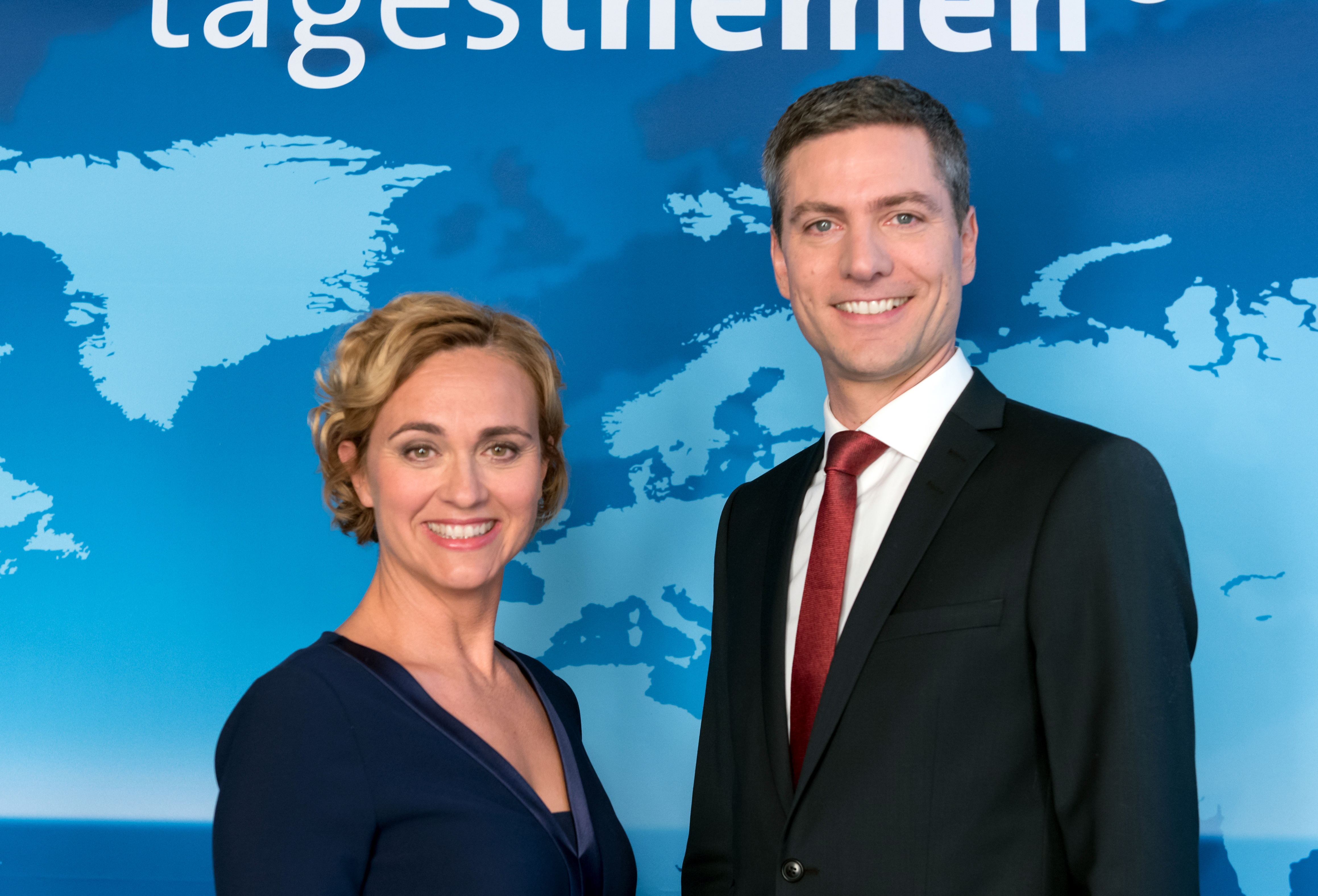 Caren Miosga mit Ingo Zamperoni bei einem Fototermin in Hamburg